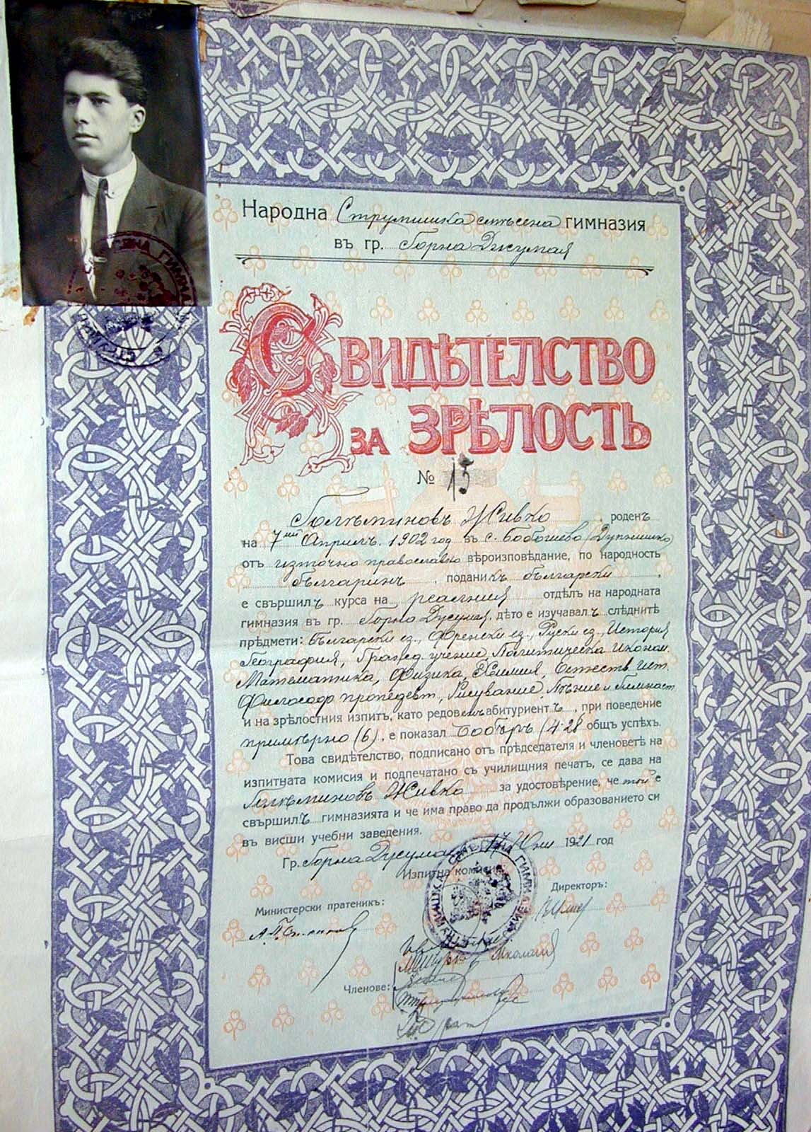 Диплома от Благоевградската гимназия.